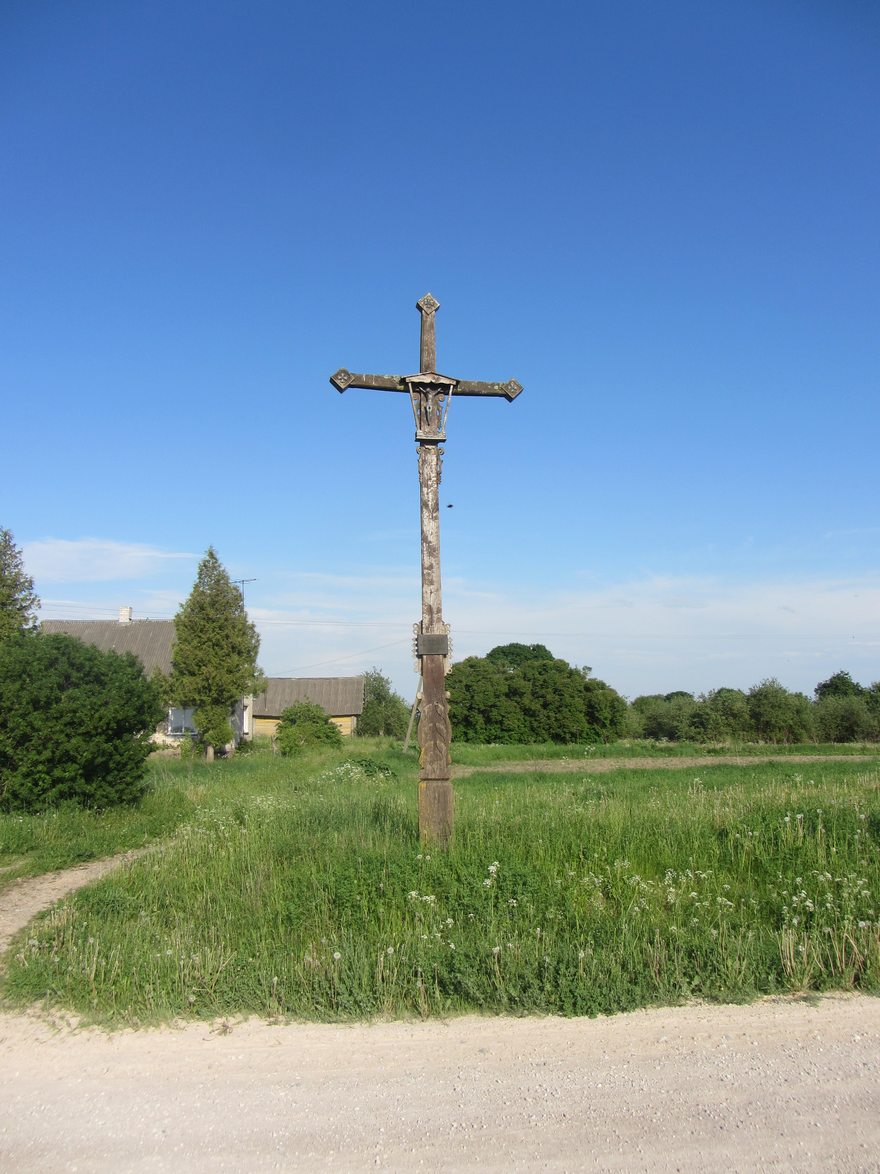 Želvos sen., Lithuania